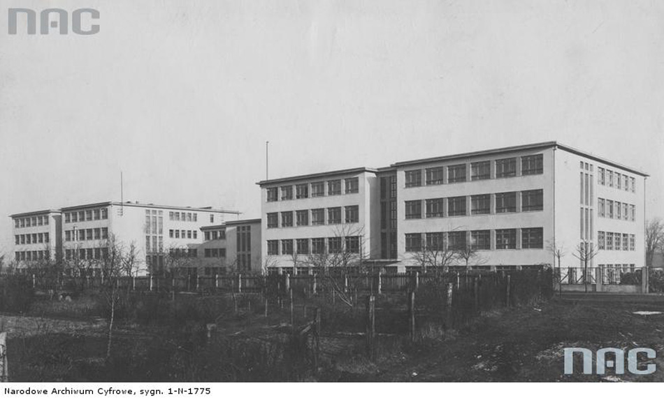 Szkoła Powszechna nr 2 w Tarnowskich Górach